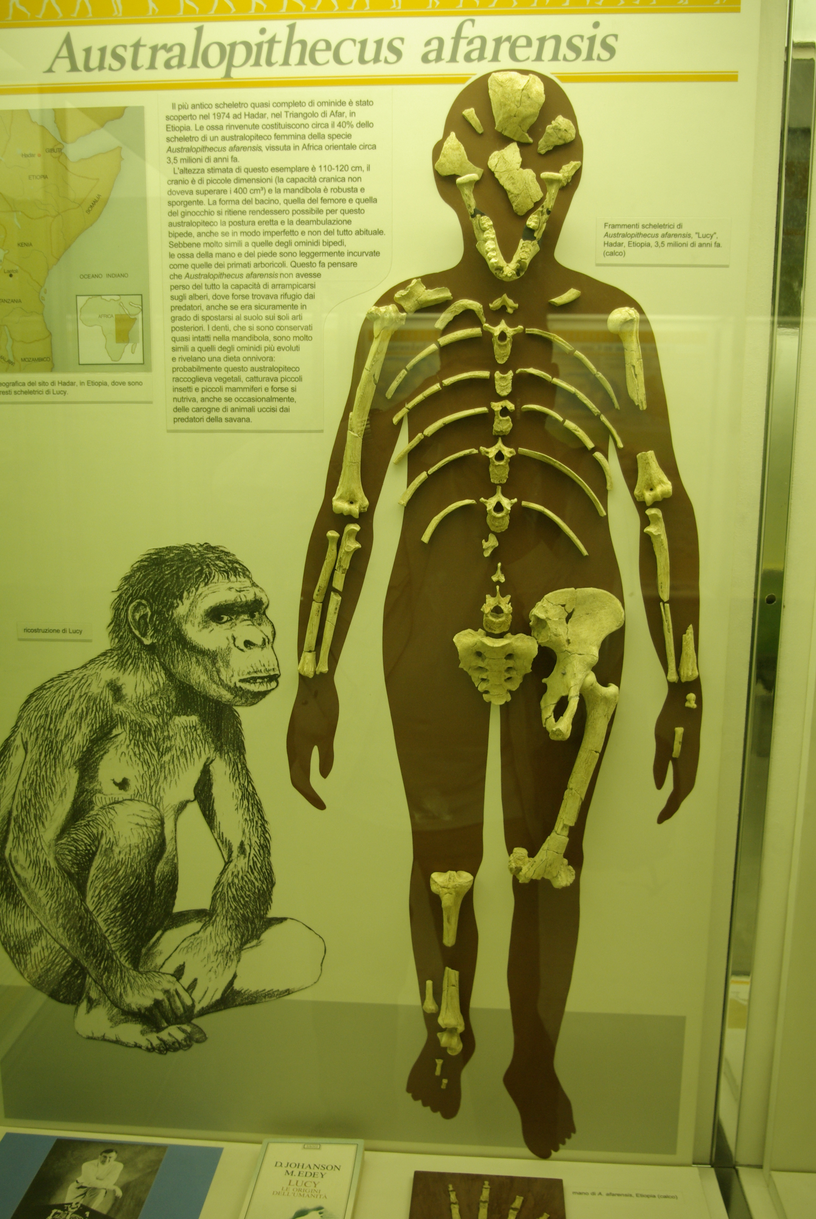 Museo civico di storia naturale This is a photo of a monument which is part of cultural heritage of Italy.